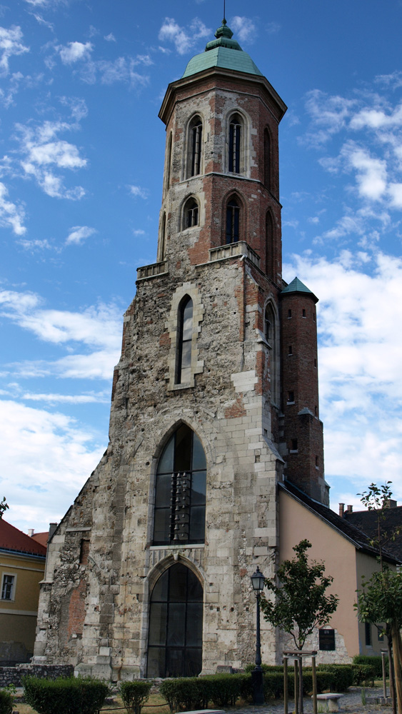 Mária Magdolna templom, Budapest, I.ker, budai vár